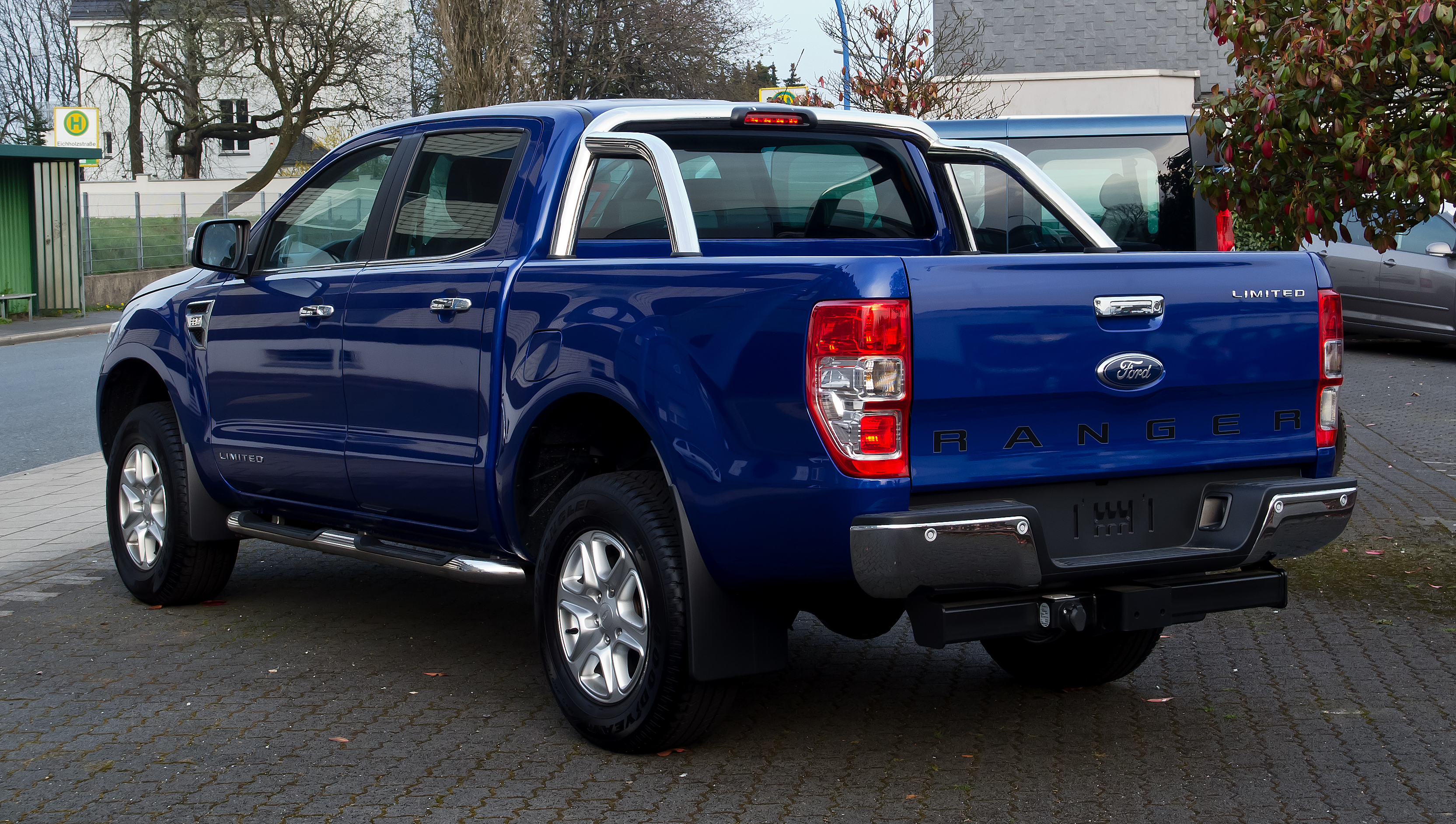 Ford Ranger 2.2 TDCi Limited Doppelkabine (III)